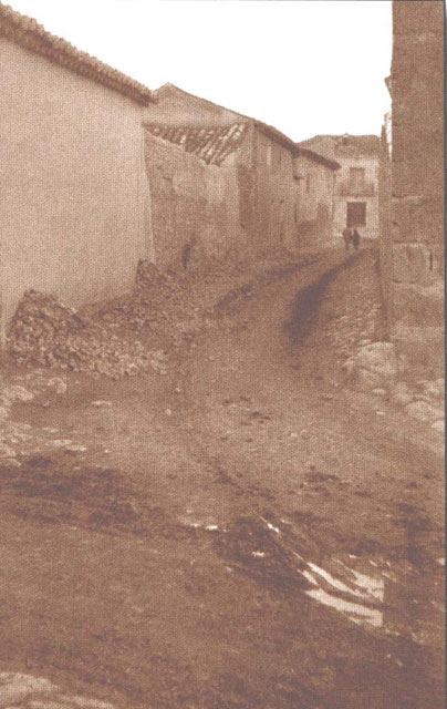 Calle Cuatro Esquinas - Urueña (Valladolid) - Fotografía B/N